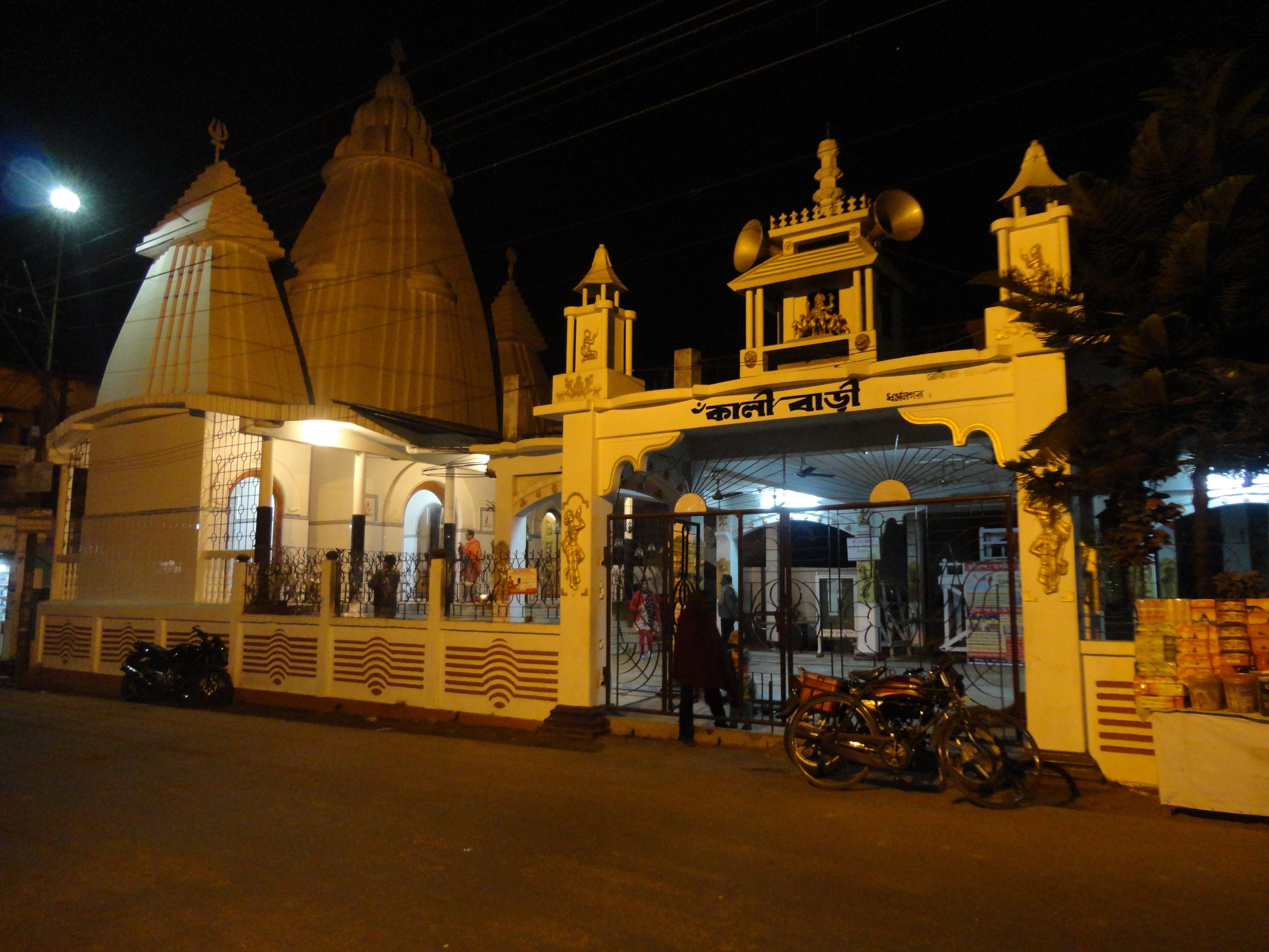 কালি বাড়ি, ধর্মনগর